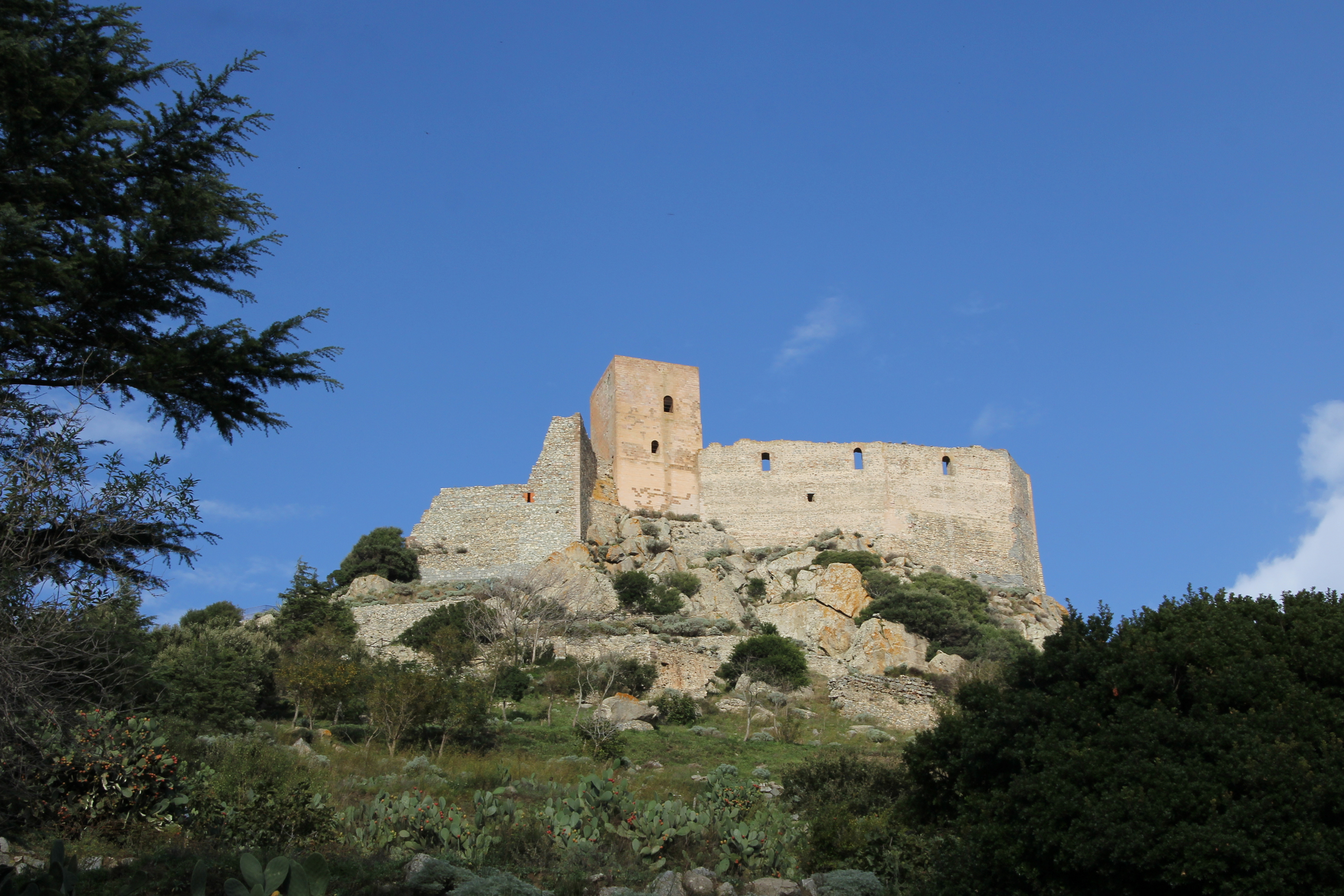 castello di Burgos